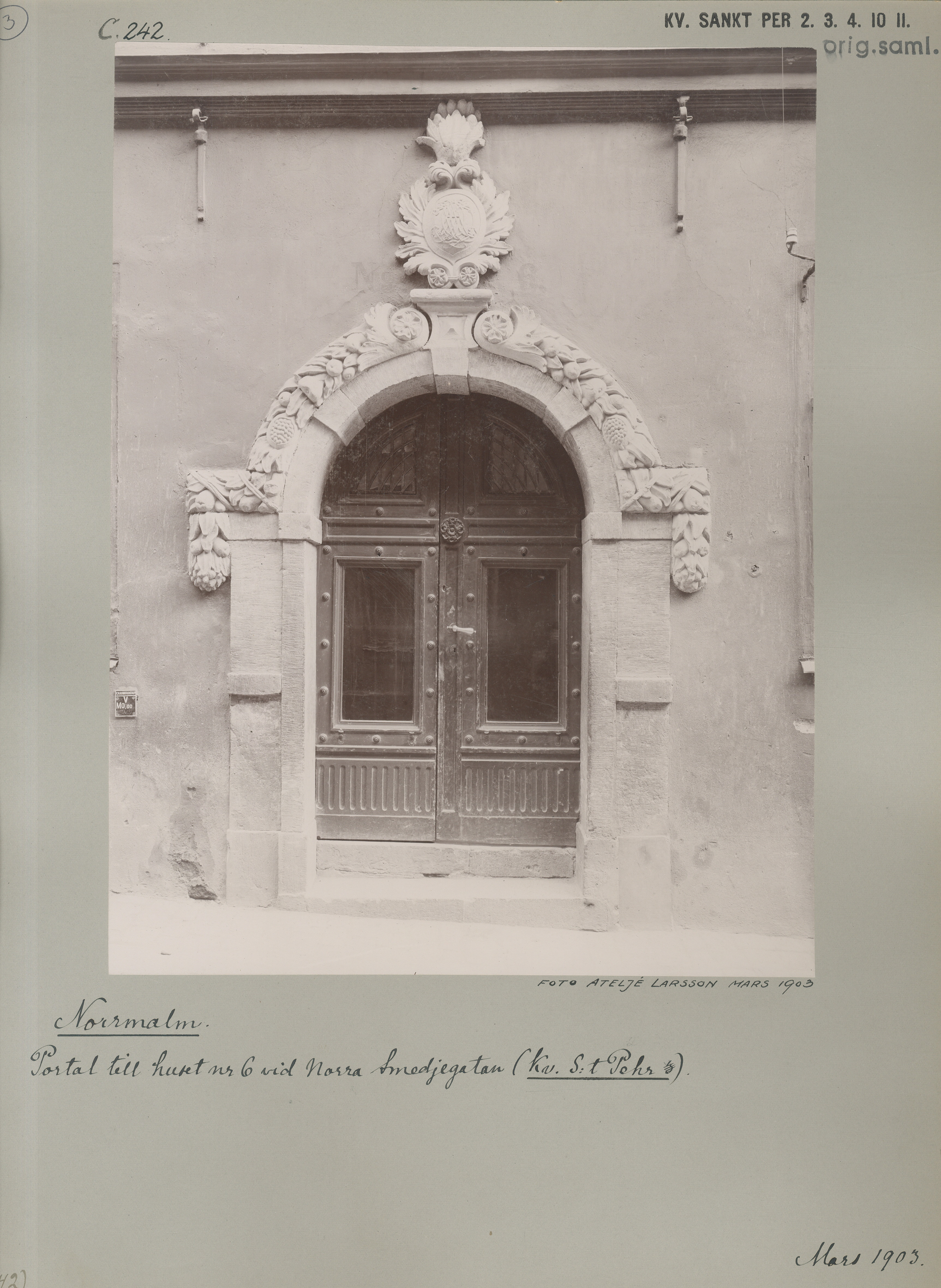 Gråark, Portal på Norra Smedjegatan 3 (1903)